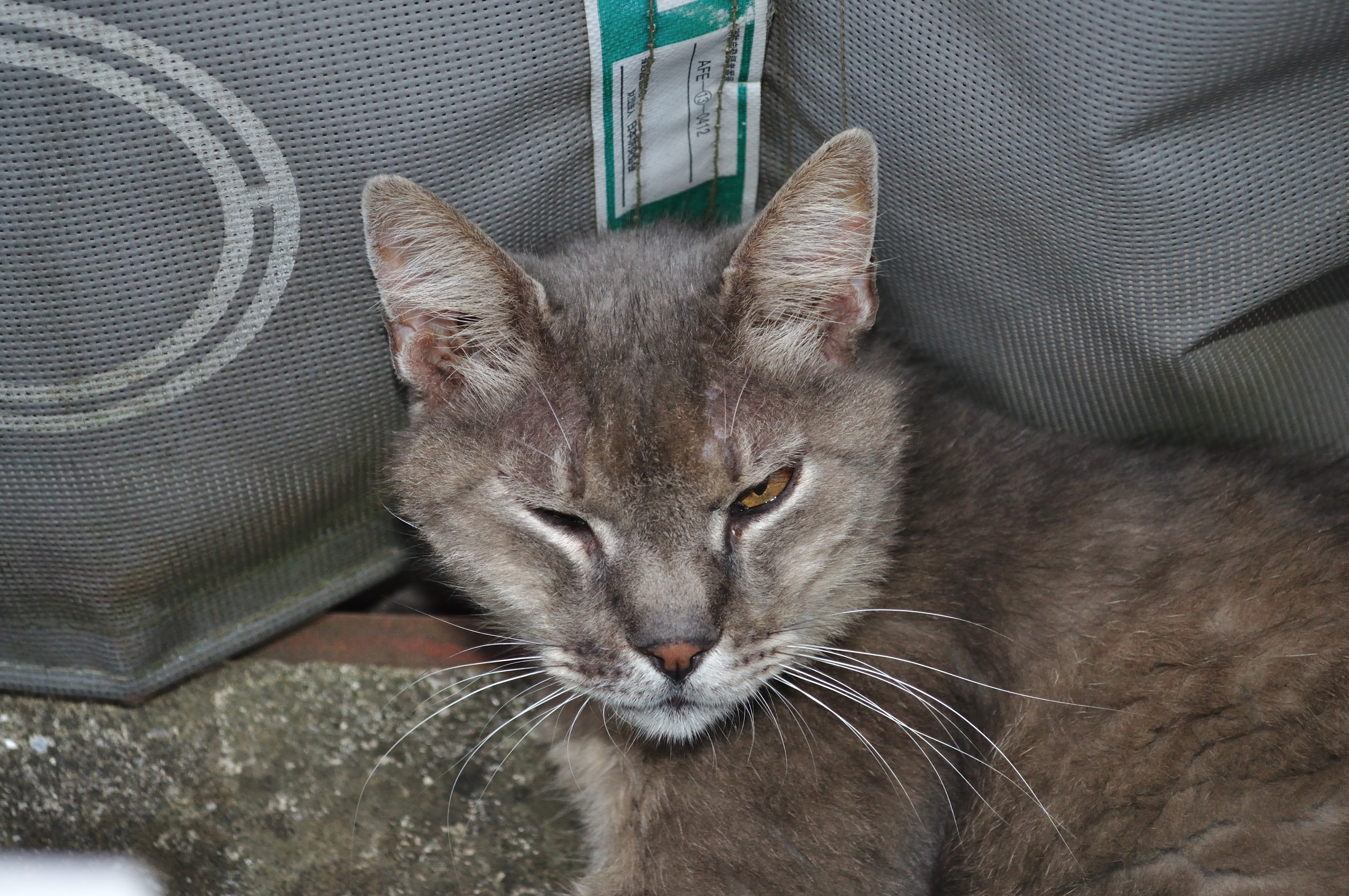 東葉高速鉄道 飯山満駅の駅猫みーちゃん